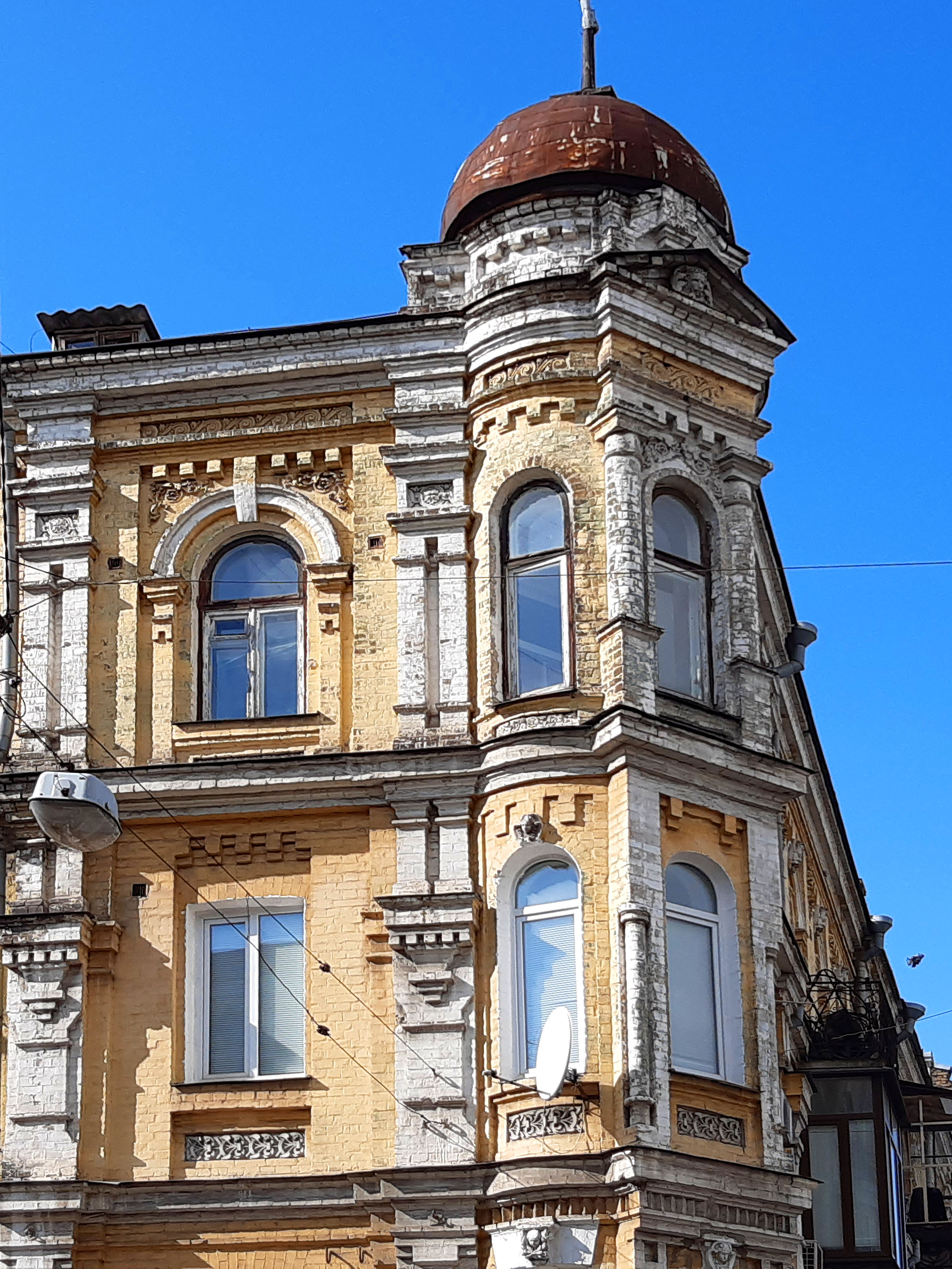 Еркер. Наріжний будинок на Бульварно-Кудрявській вулиці , 30/13. Київ